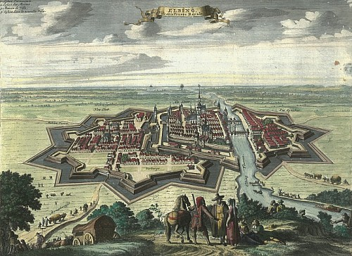 ELBLĄG Elbing, Ville de la Prusse Royale. A Leide, Chez Pierre van der Aa. [ok. 1720]. Miedzioryt ręcznie kolorowany 25,5x34,5 cm, na arkuszu 31x39 cm.